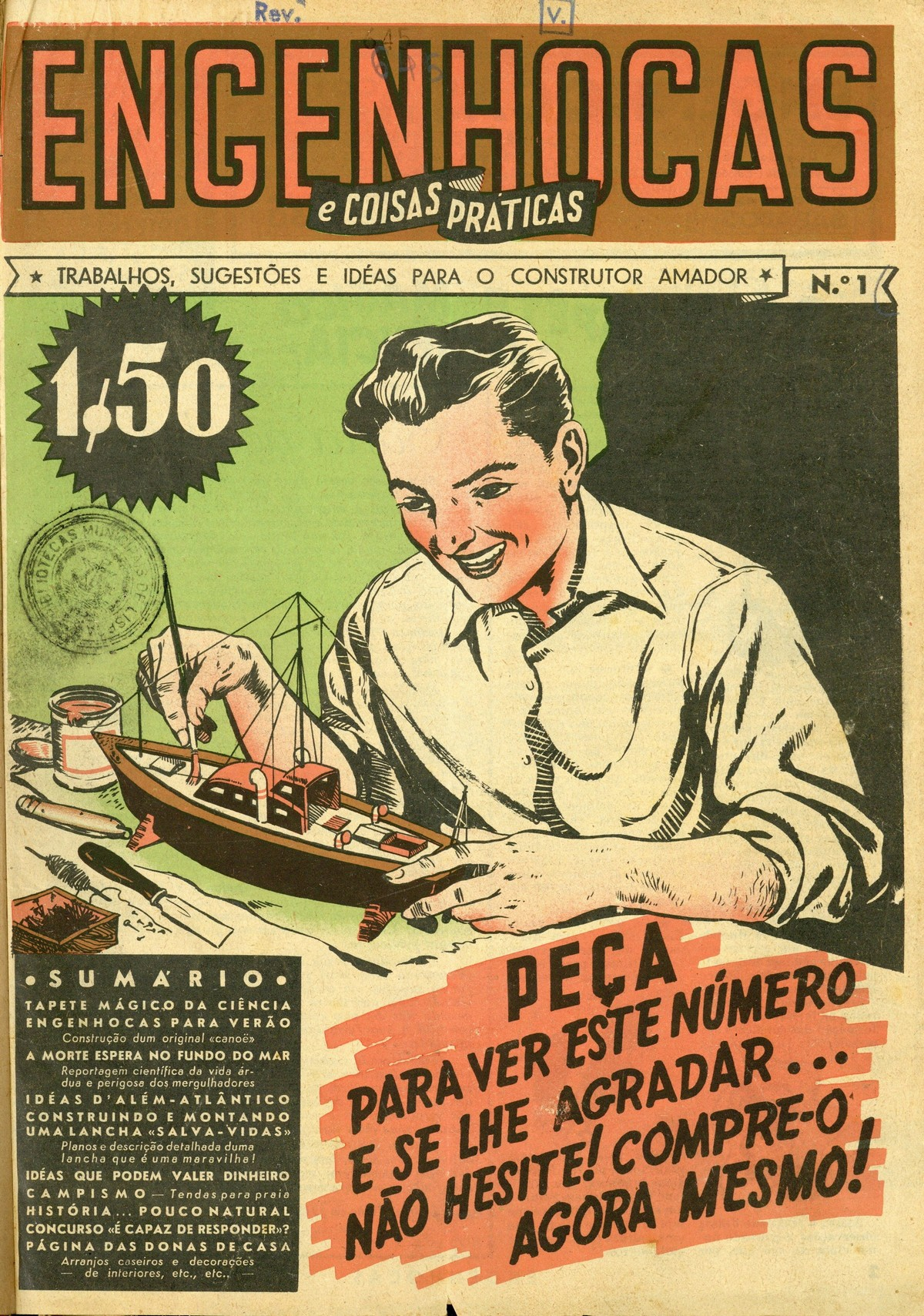 Capa da revista Engenhocas e Coisas Práticas nº 1